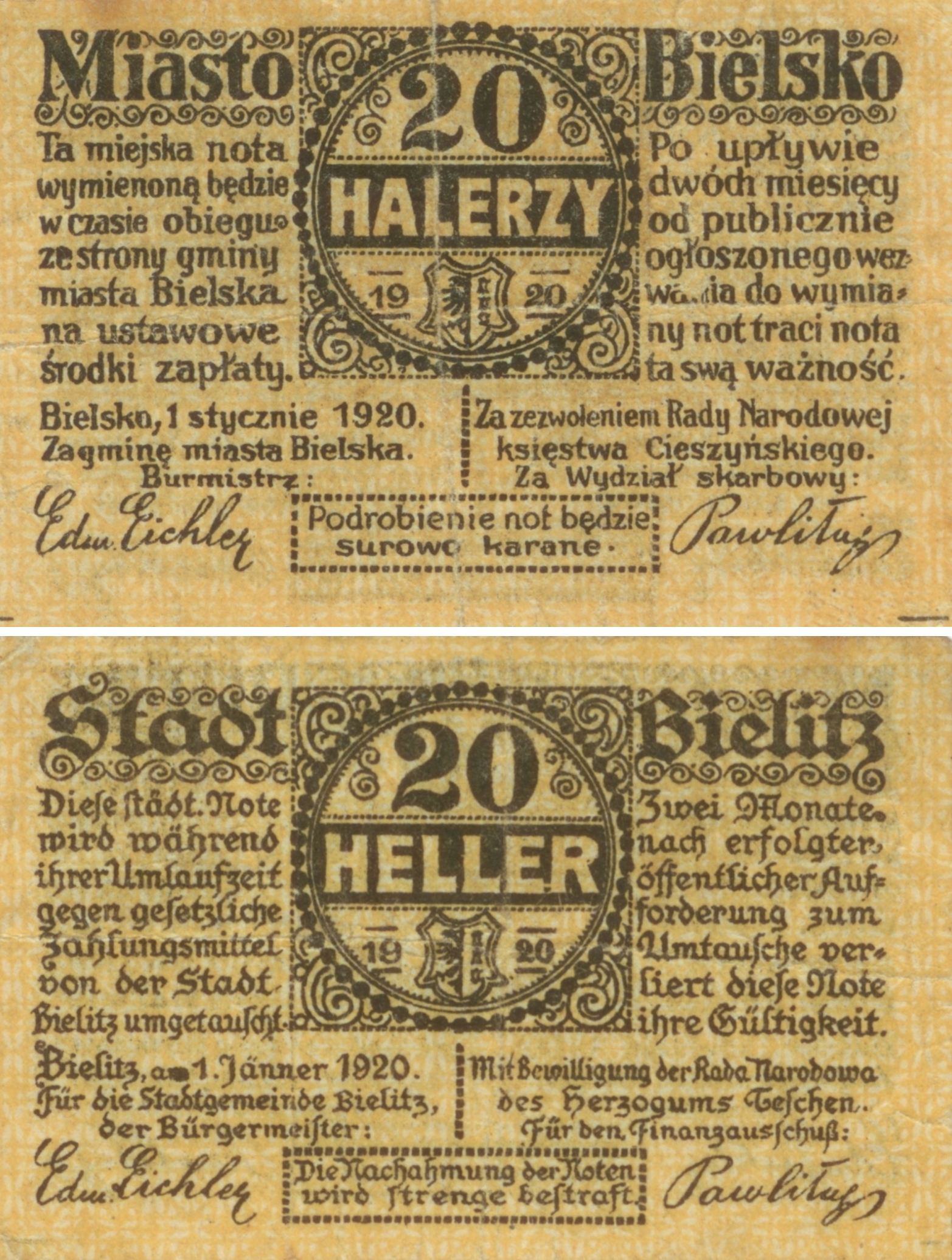 Bielsko - banknot zastępczy, 20 halerzy, 1920